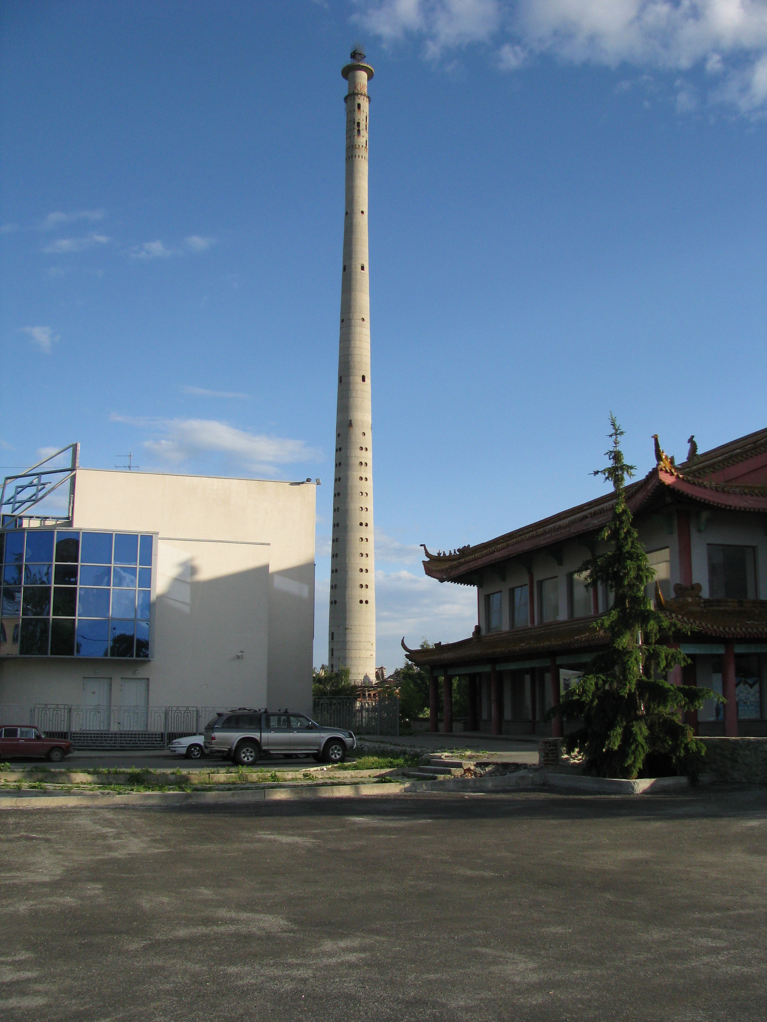 Здание, ранее бывшее самым высоким заброшенным в мире. Телебашня в Екатеринбурге начала строиться в 1983 году и должна была стать второй по высоте в России после Останкинской, но была достроена лишь до 220 м (по проекту 360м) и уже почти 20 лет заброшена. Снесена 24 марта 2018 года.